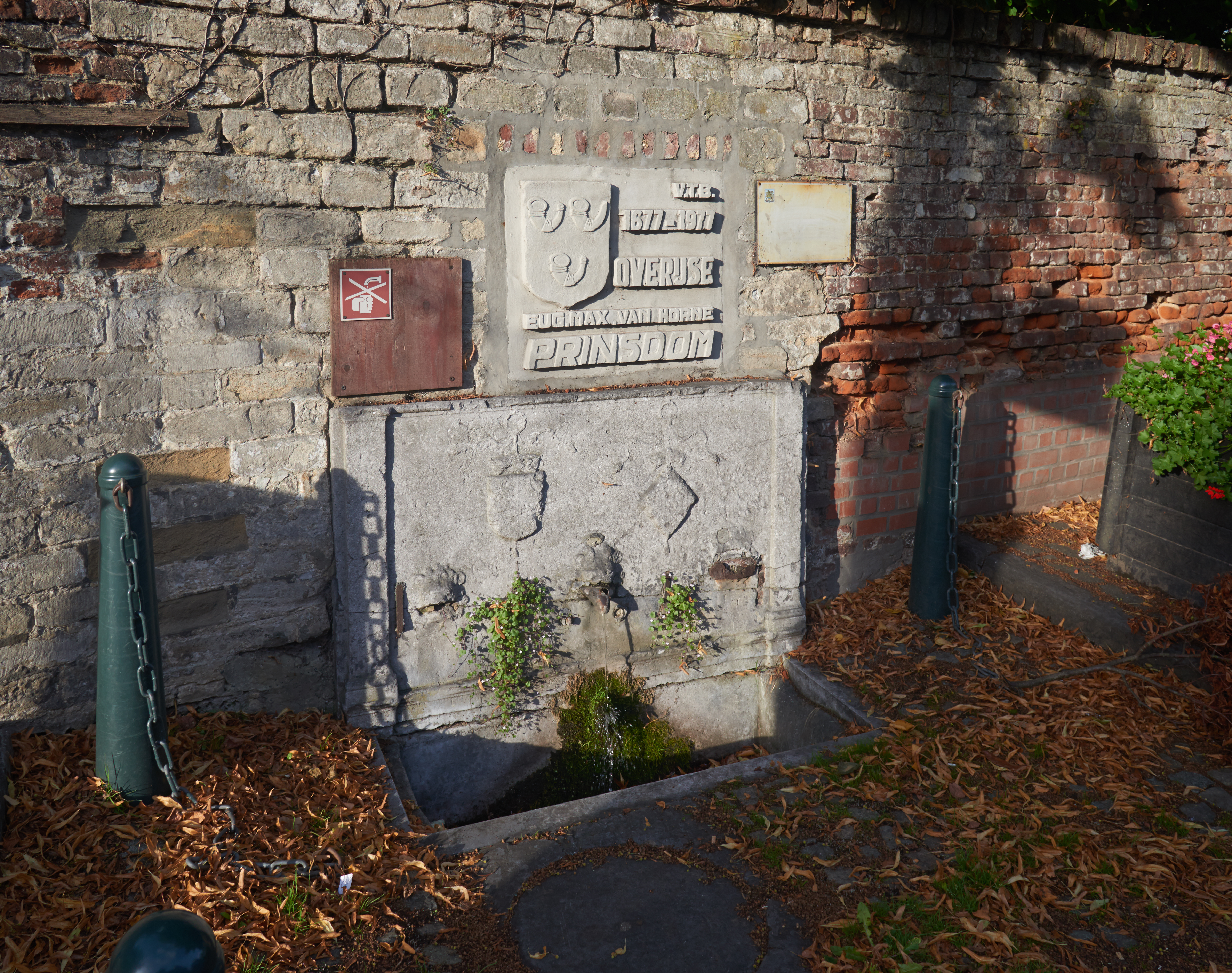 Bron bij het Kasteel van IJse in Overijse met een plakette met de tekst "1677-1977 Overijse Eug.Max. Van Horne Prinsdom"